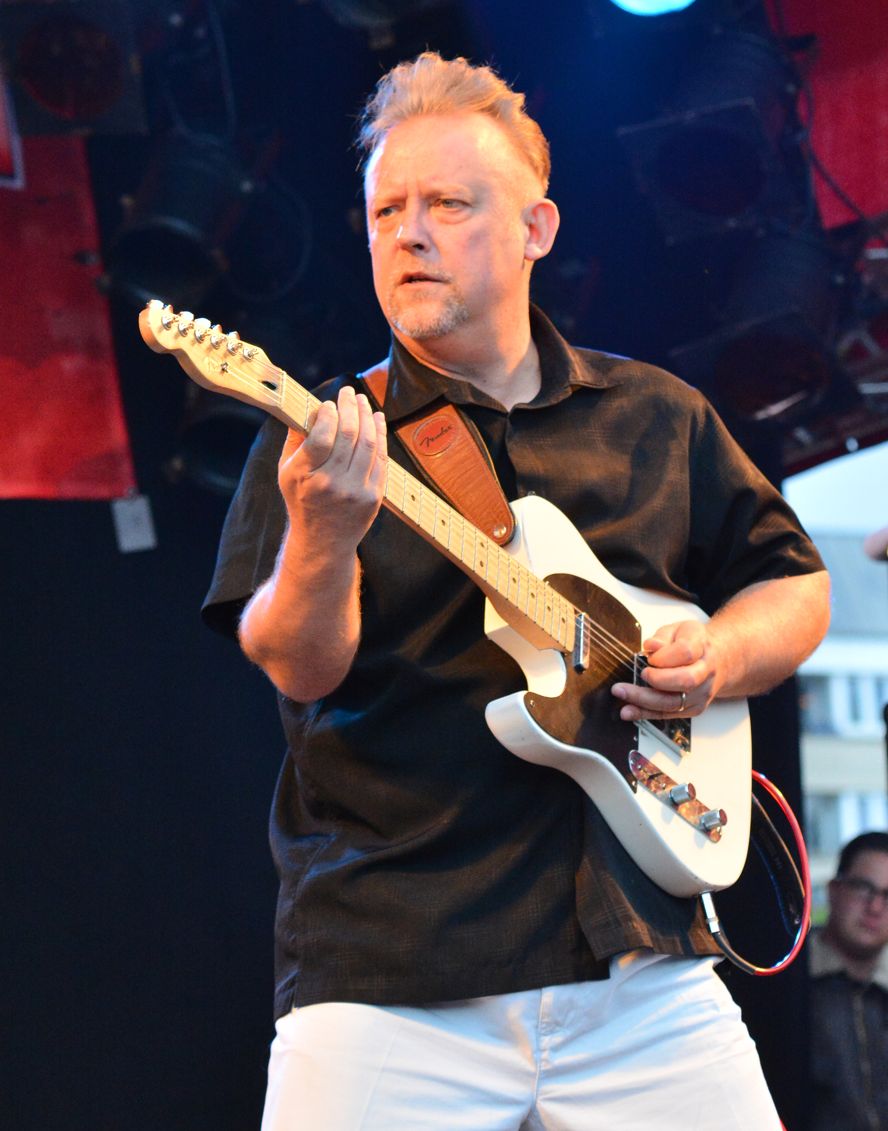 Die britische Neo-Rockabilly Band Restless beim 825. Hamburger Hafengeburtstag 2014